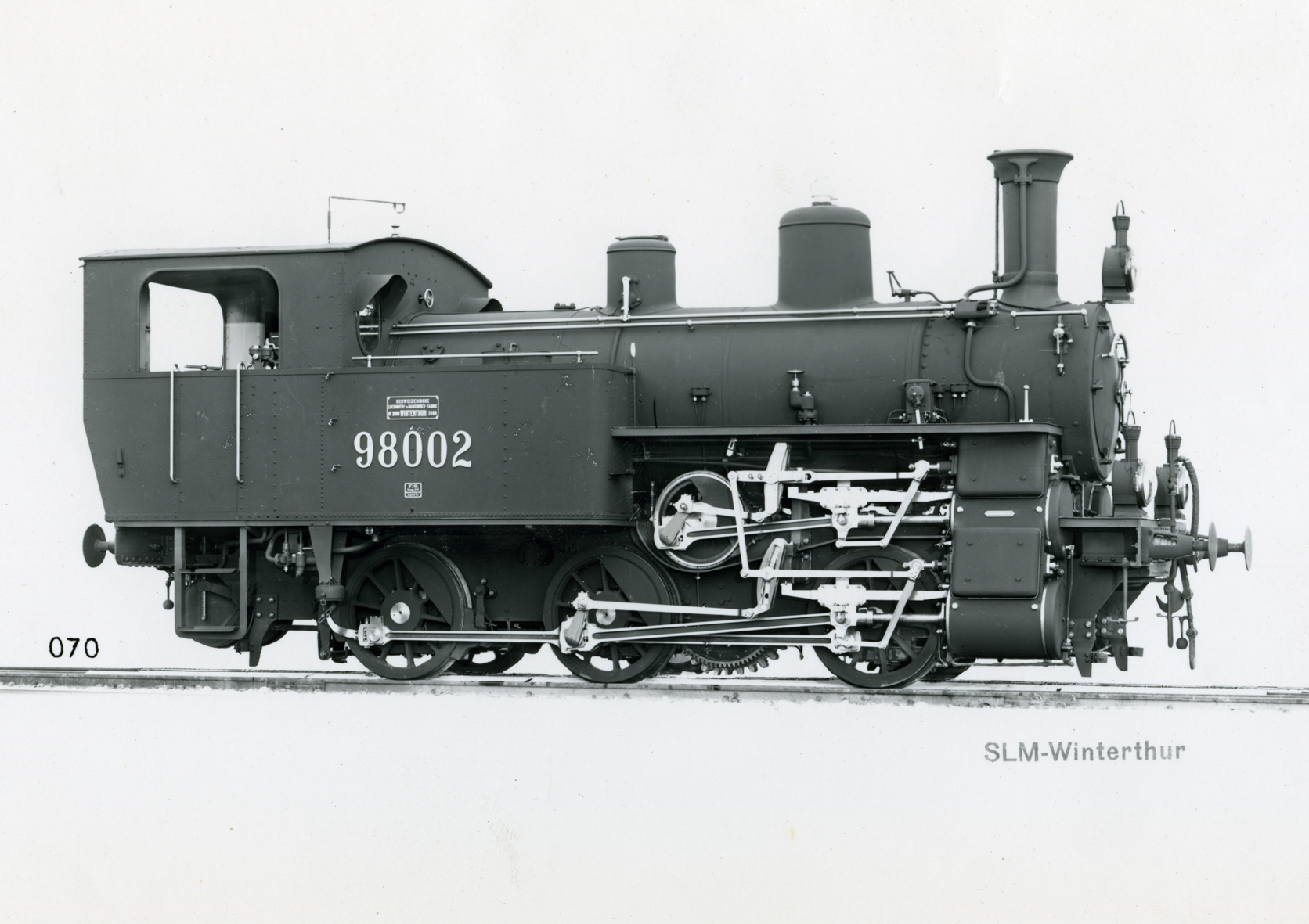 Locomotiva Gruppo 980